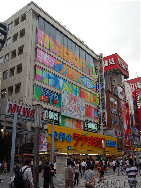 아키바하라 라디오회관